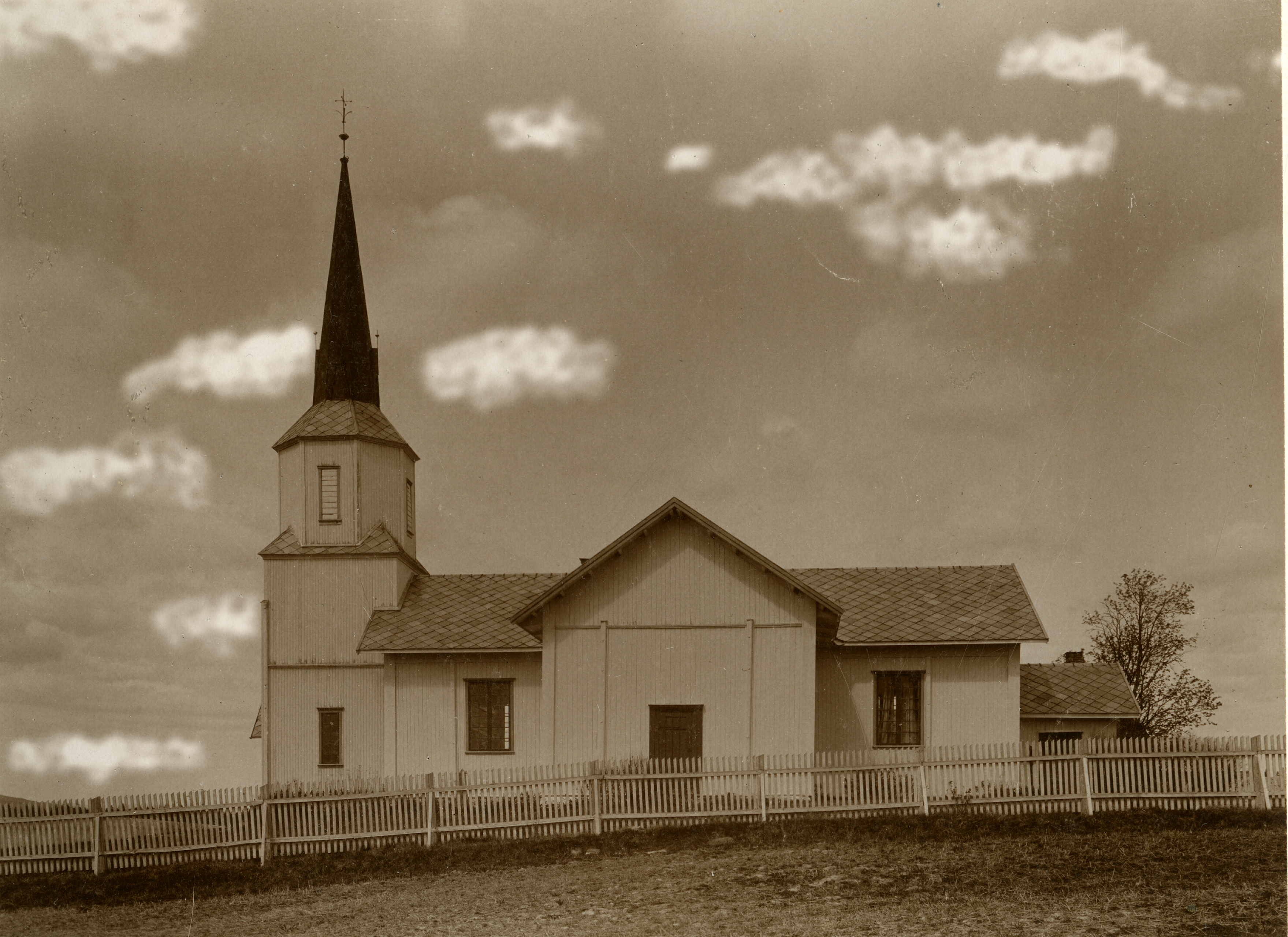 Fenstad kirke i Fenstad, Akershus